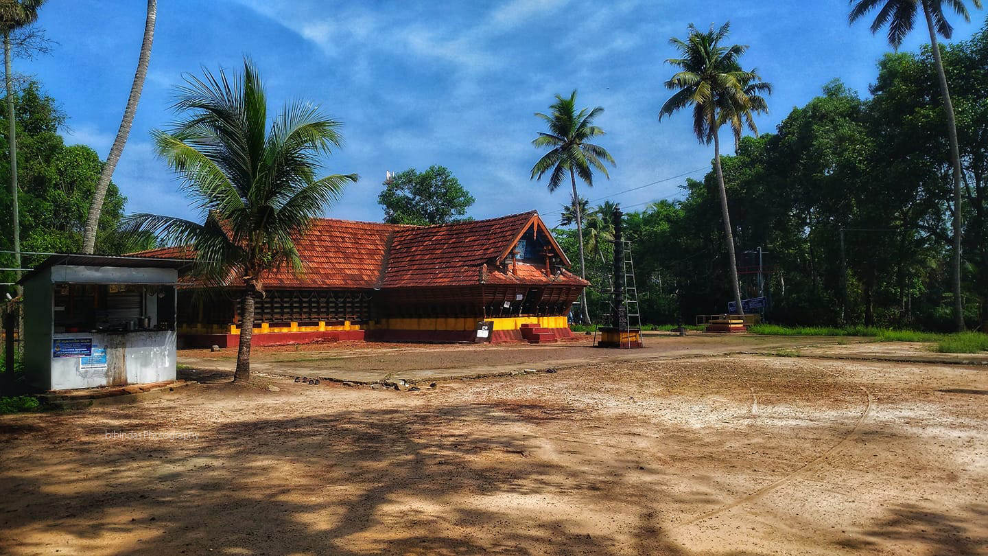 കരുമാടി ശങ്കര നാരായണ ക്ഷേത്രം.. ഇവിടുത്തെ ശ്രീകോ വിലിനു മുന്നിലുള്ള കല്‍വിളക്ക്‌ അനുദിനം പിന്നോട്ട് നീങ്ങിക്കൊണ്ടിരിക്കുകയണത്രേ ..